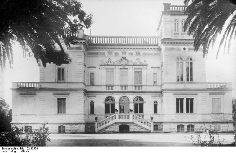 Das berühmte Schloss Achilleion, der ehemalige Besitz Exkaiser Wilhelm II. wird Hotel. Das auf der griechischen Insel Korfu stehende Schloss Achilleion, das früher dem Exkaiser Wilhelm II. gehörte, wird auf Beschluss der griechischen Regierung in ein Hotel umgebaut.